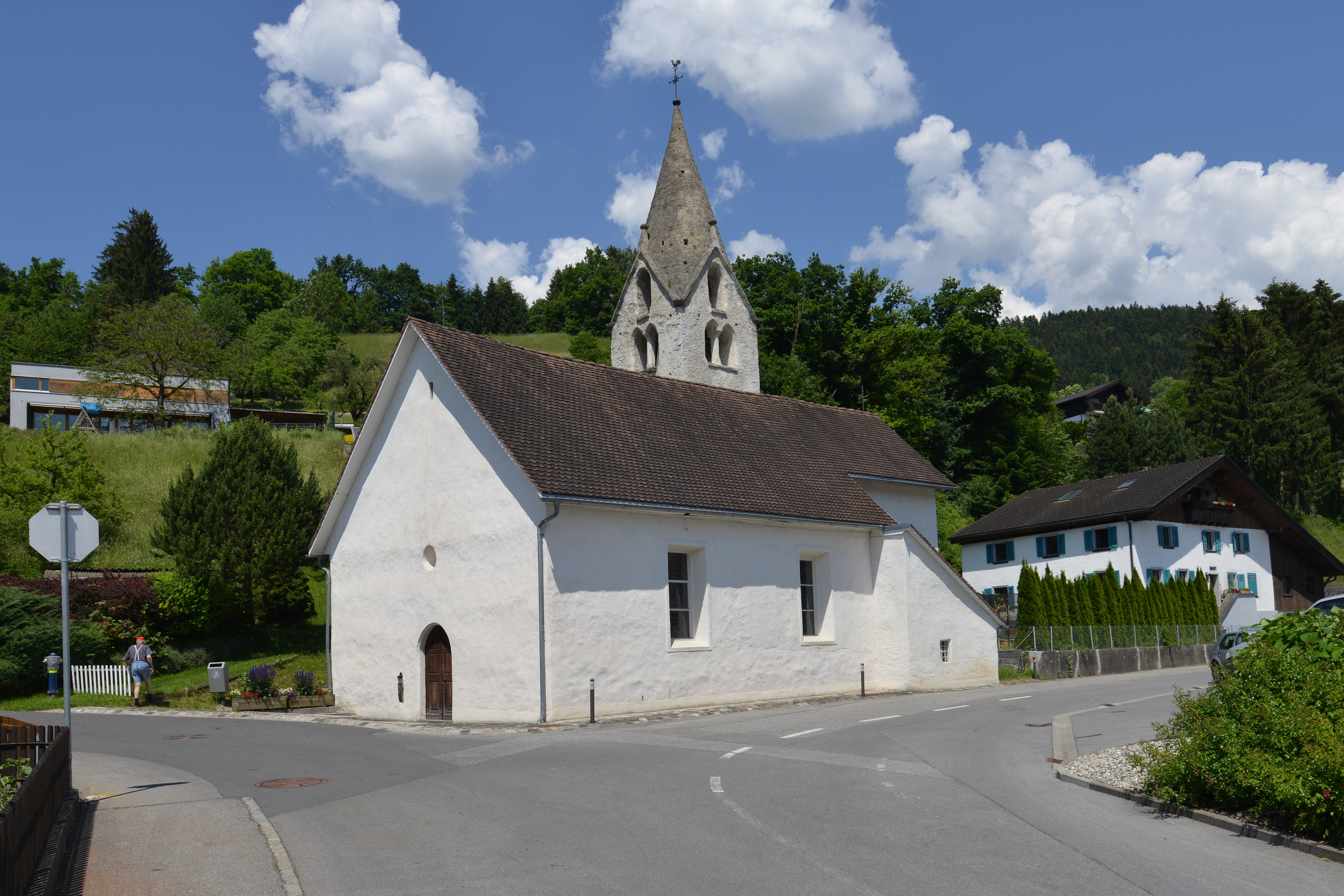 Bludesch, Filialkirche hl. Nikolaus, in Zitz. Urkundlich um 842 "Cise". 1483 Kaplanei. Breiter spätromanischer Bau mit eingezogenem quadratisch barockem Chor unter gemeinsamen Satteldach, Rechteckfenster; Nord-Tur, mit gekoppelten un einfach darüber gestellten Schallöffnungen, vorkragendem Giebelgesims, gemauertem Giebelspitzhelm mit knopfartigen Fialen. Südlich an Langhaus und Chor angebaute Sakristei mit Pultdach von 1629. Im Chor ehemalige Rundapsis durch Ausgrabungen festgestellt, Ummantelung 1629/30.